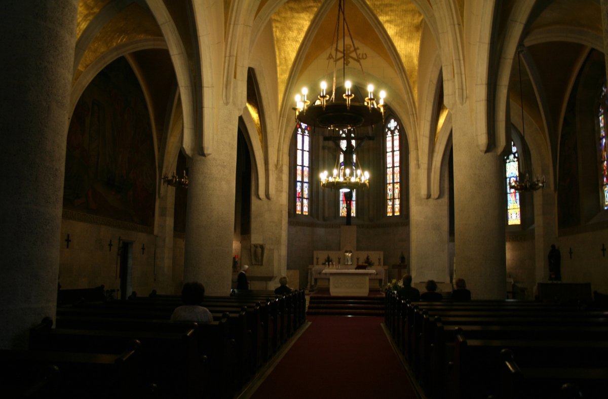 Unutrašnjost crkve svetog Marka u Zagrebu